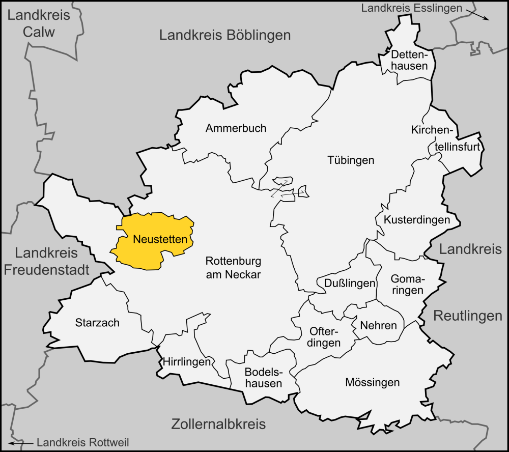 Karte der Gemeinde Neustetten im Landkreis Tübingen